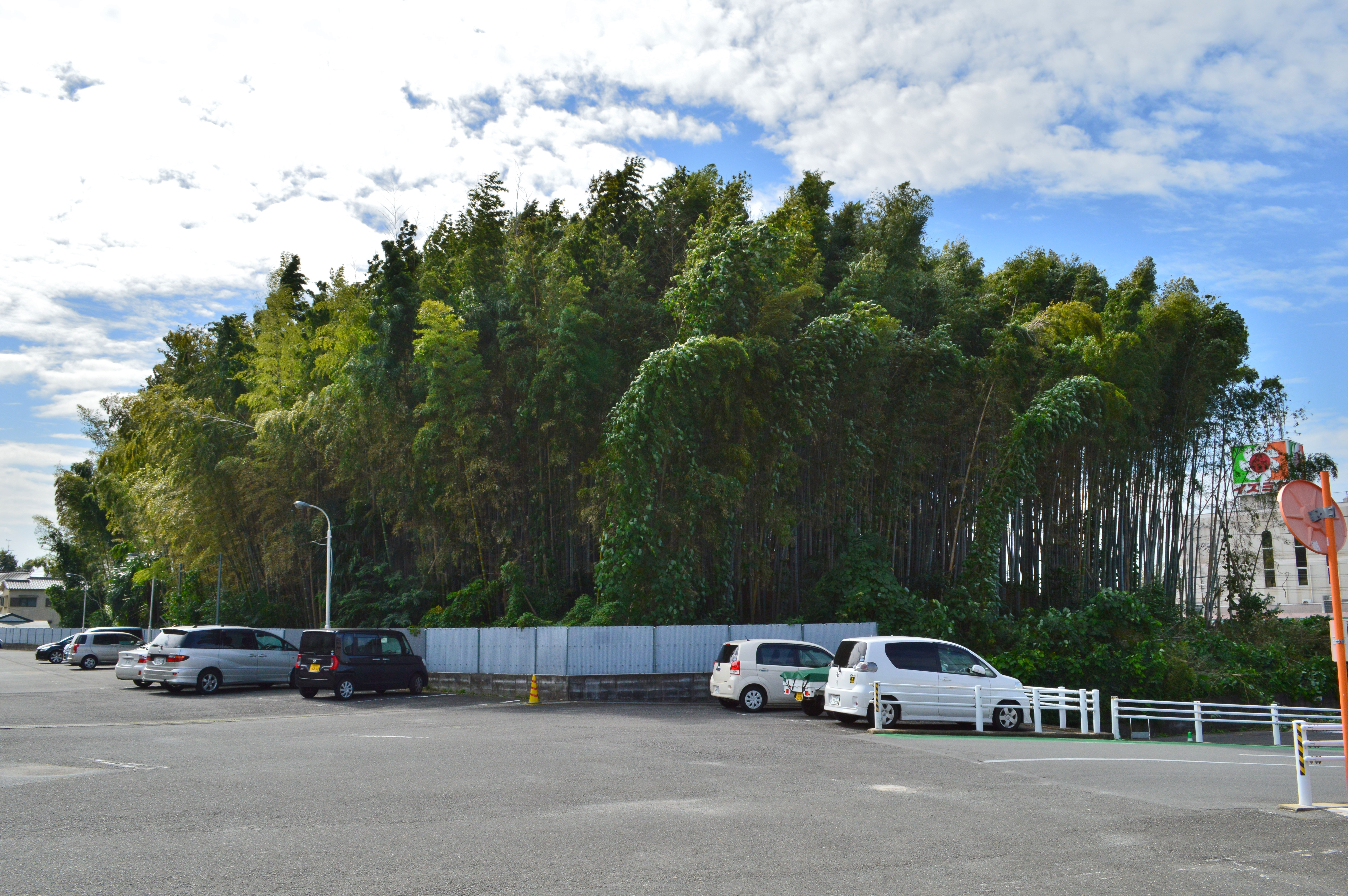 芭蕉塚古墳 墳丘全景